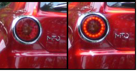 Fari della nuova Alfa Romeo MiTo, confronto fra accesi e spenti